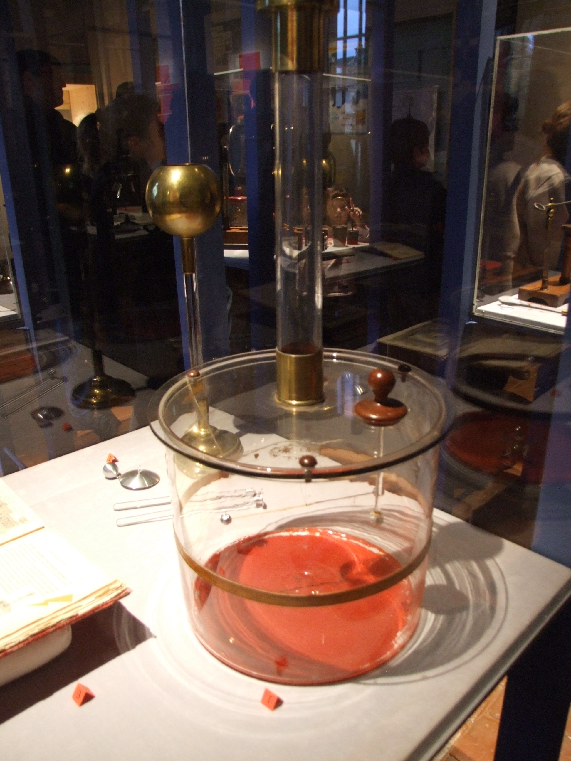 Balance de Coulomb, Exposition Hautes Tensions, 18 Octobre 2008 - 5 Janvier 2009, Musée de la vie bourguignonne, Dijon, Bourgogne, France